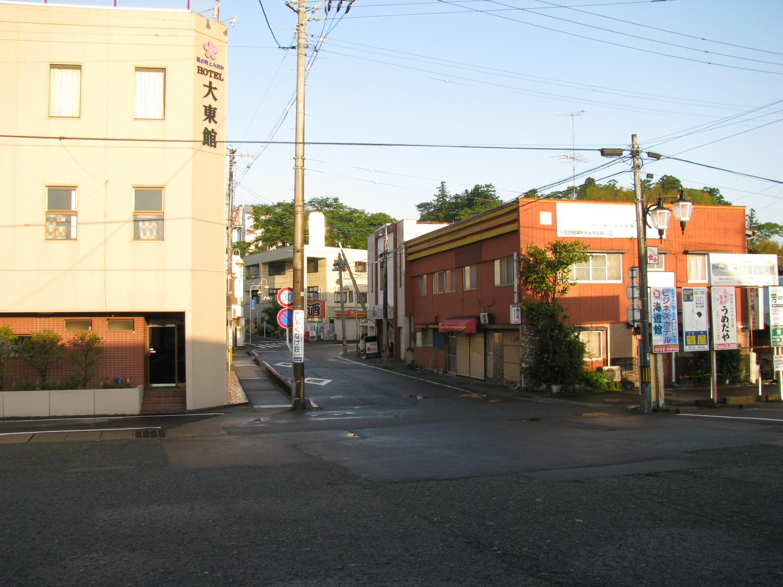 東日本旅客鉄道常磐線富岡駅駅前